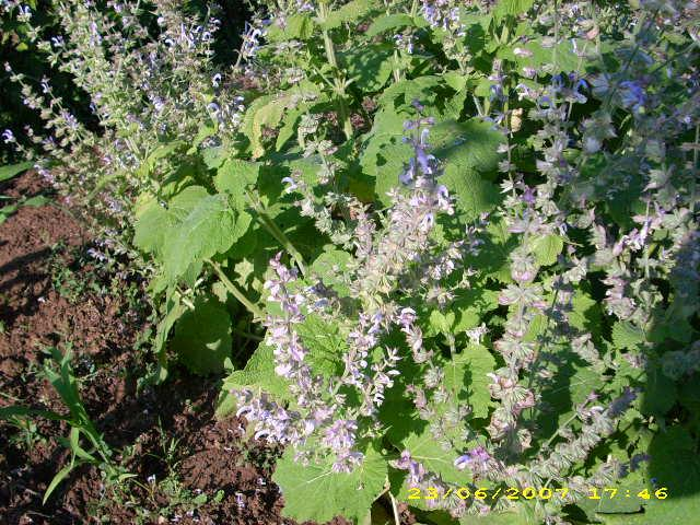 Kerti zsálya (Salvia officinalis L.) virágzáskor, Regenye